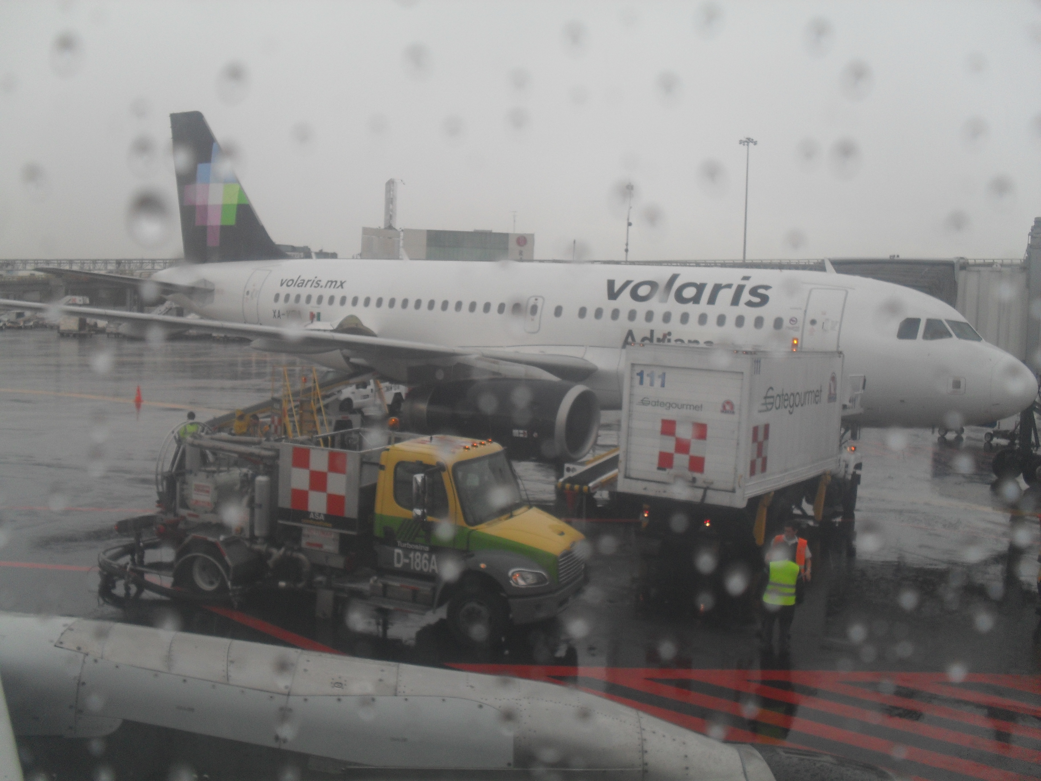 abordo de un avion A319 de la marca volaris de nombre eduardo en el aeropuerto internacional de la ciudad de mexico,mirando hacia otro avion A319 de nombre adriana de la misma aerolinea.